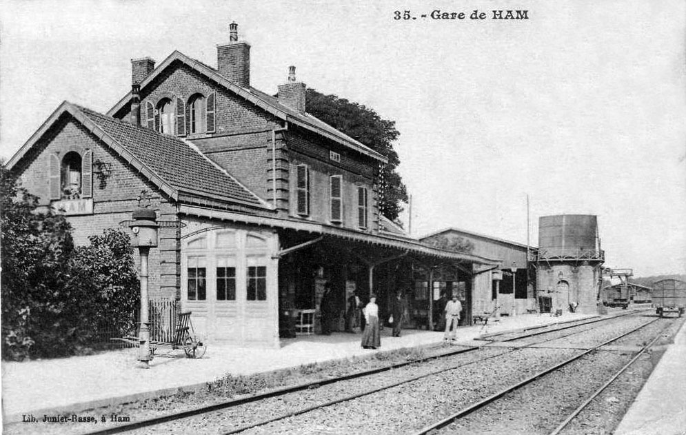 Gare de Ham (Somme), le premier bâtiment voyageurs détruit pendant la première guerre mondiale.